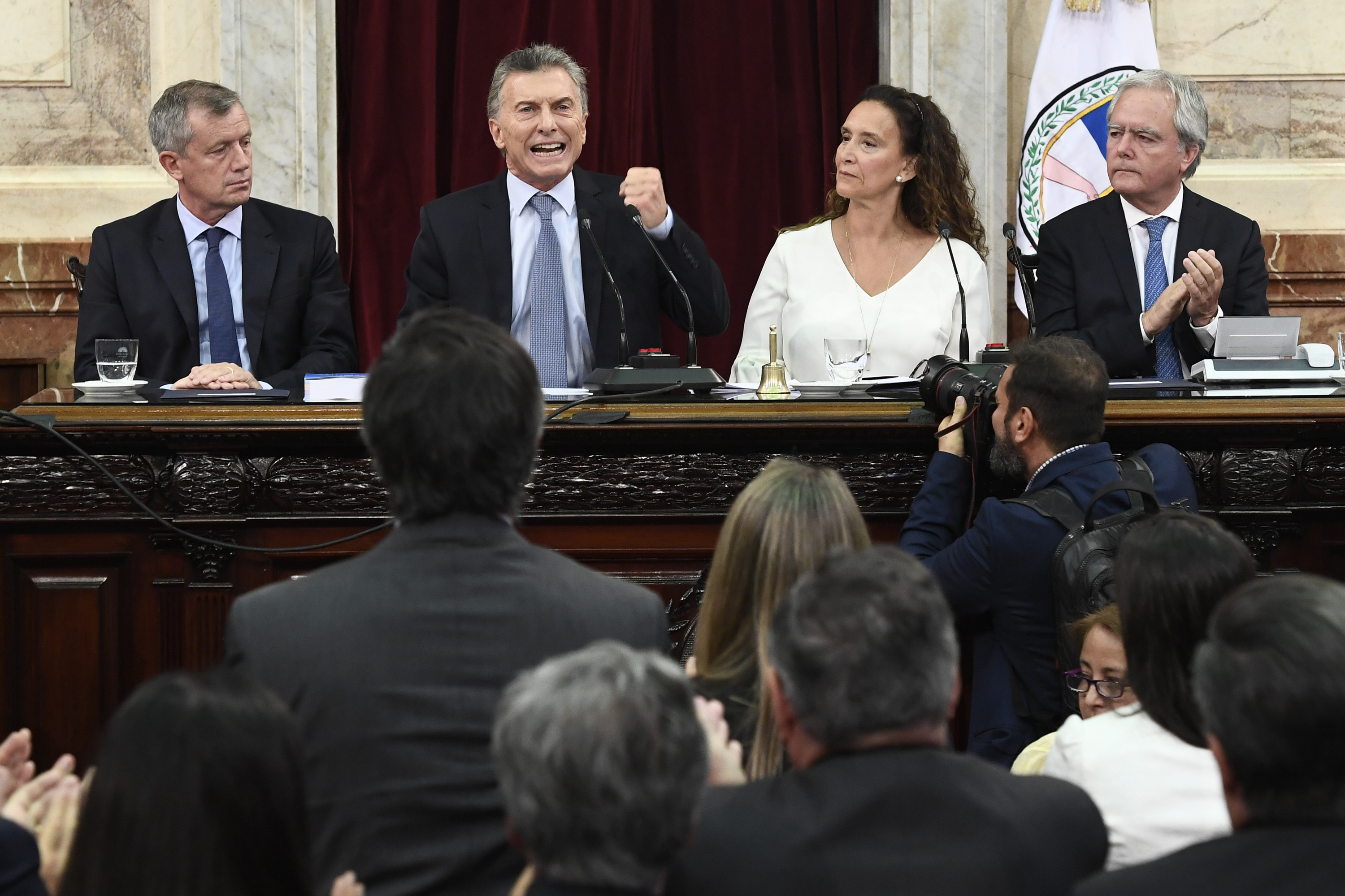 Mauricio Macri durante la Asamblea Legislativa de 2019